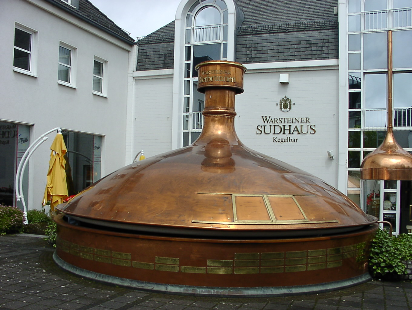 Sudkessel